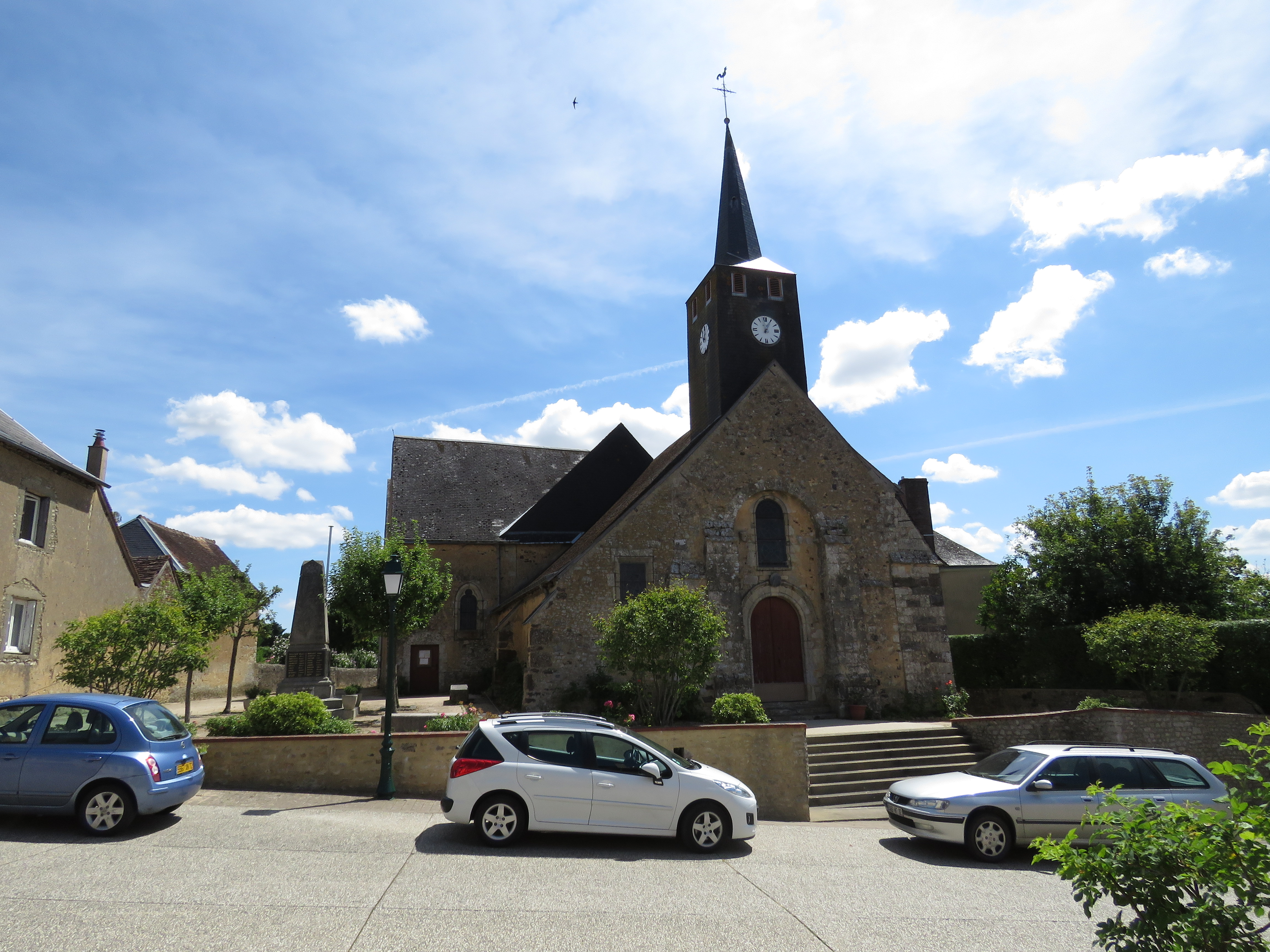 Façade ouest de l'église.